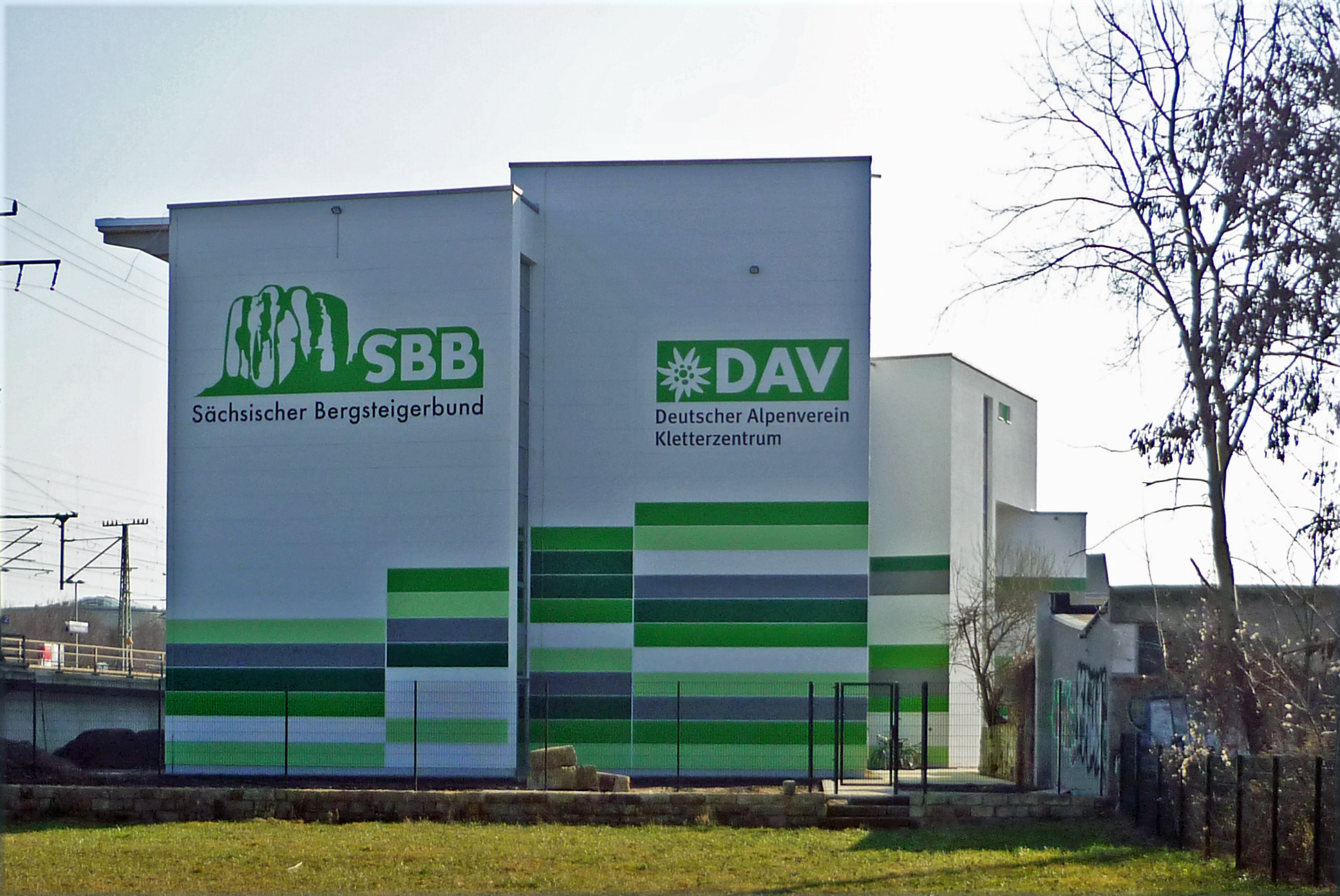 DAV-Kletterzentrum des Sächsischen Bergsteigerbundes in Dresden in der Papiermühlengasse (eingeweiht am 30.01.2015)